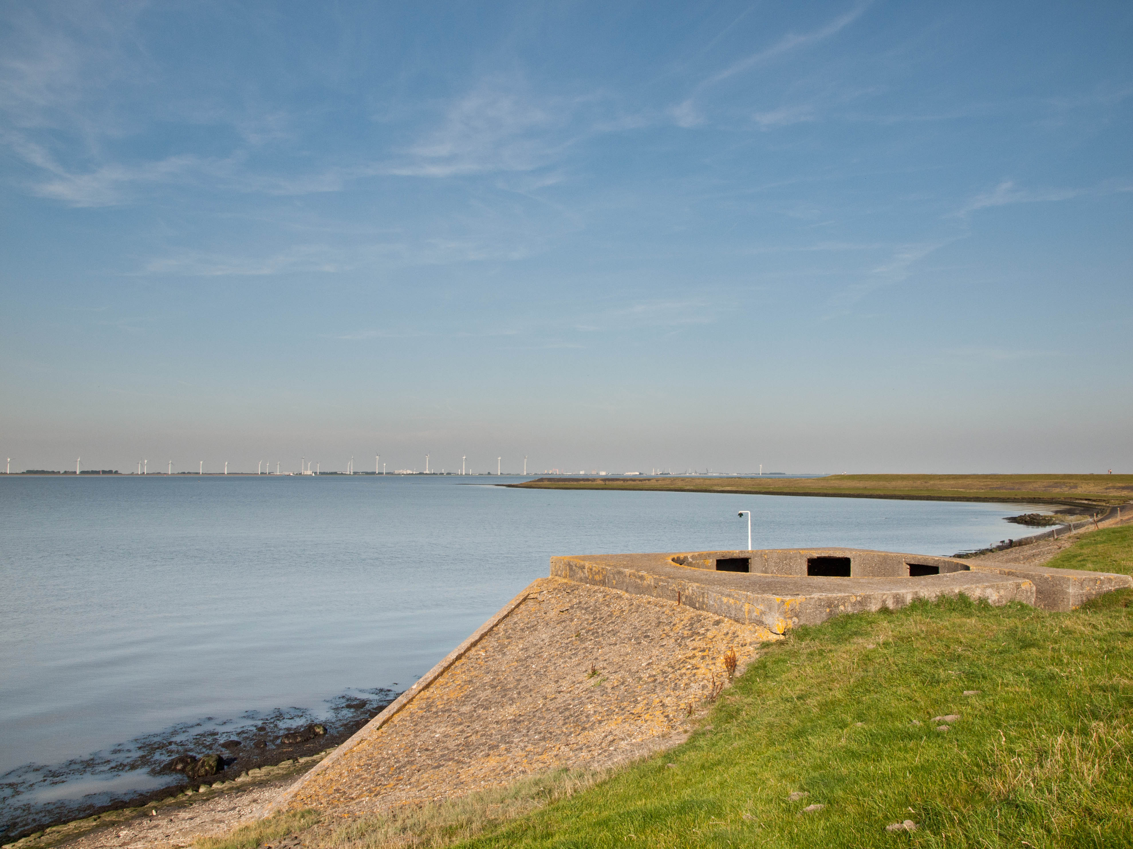 Geschut sokkel bij Fiemel / Punt van Reide